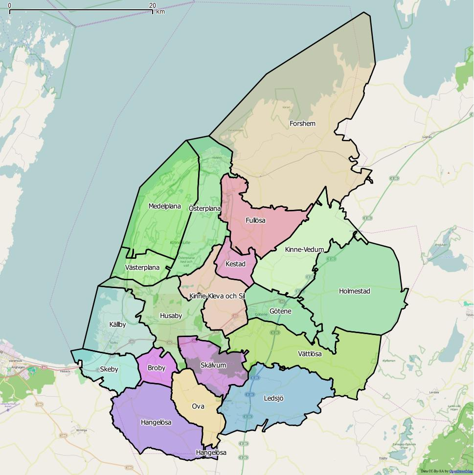 Distriktsindelningen i Götene kommun